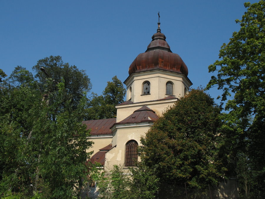 Płazów (Poland), Greek Catholic church